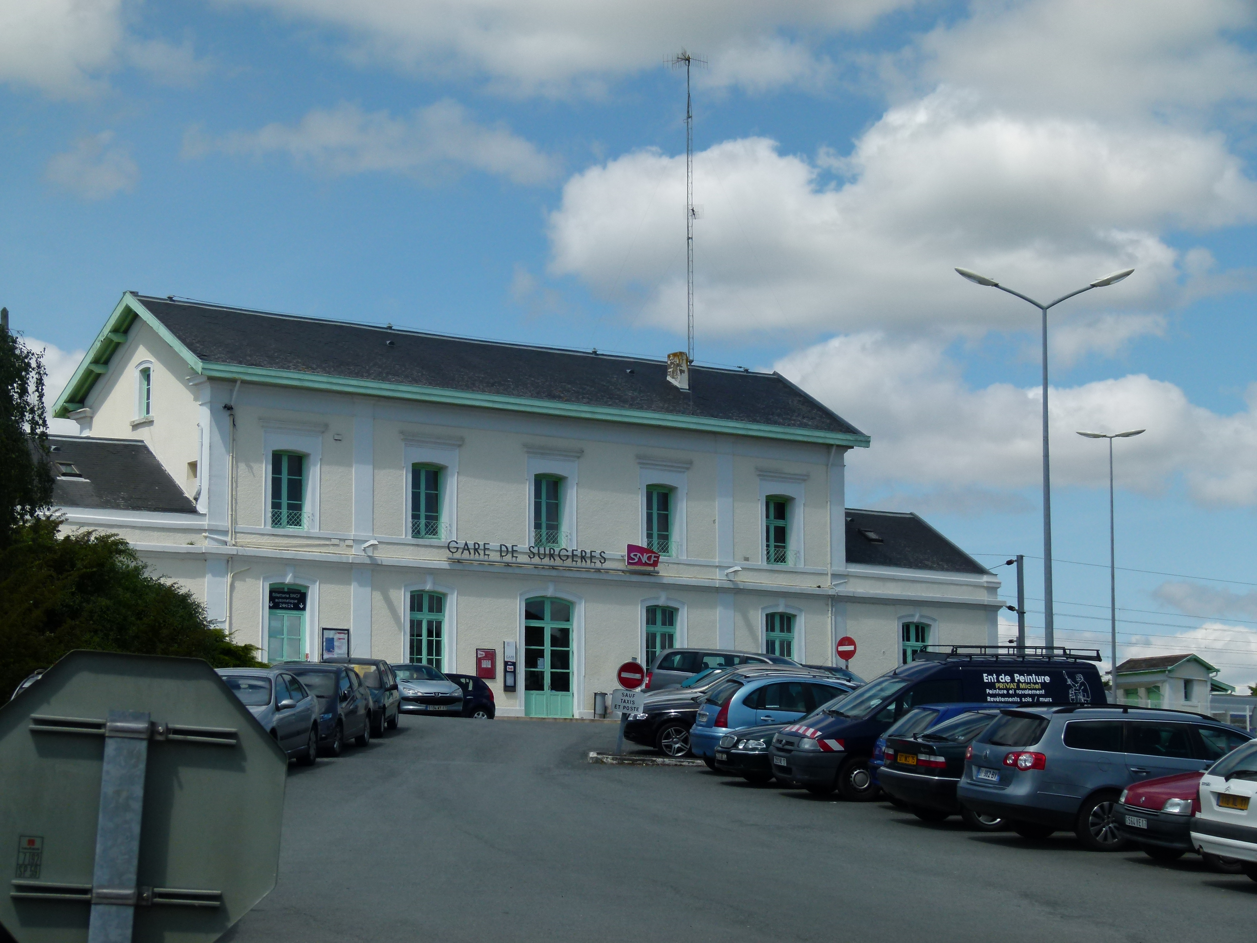 Façade sud de la gare ferroviaire de Surgères vue depuis le parking en contrebas.